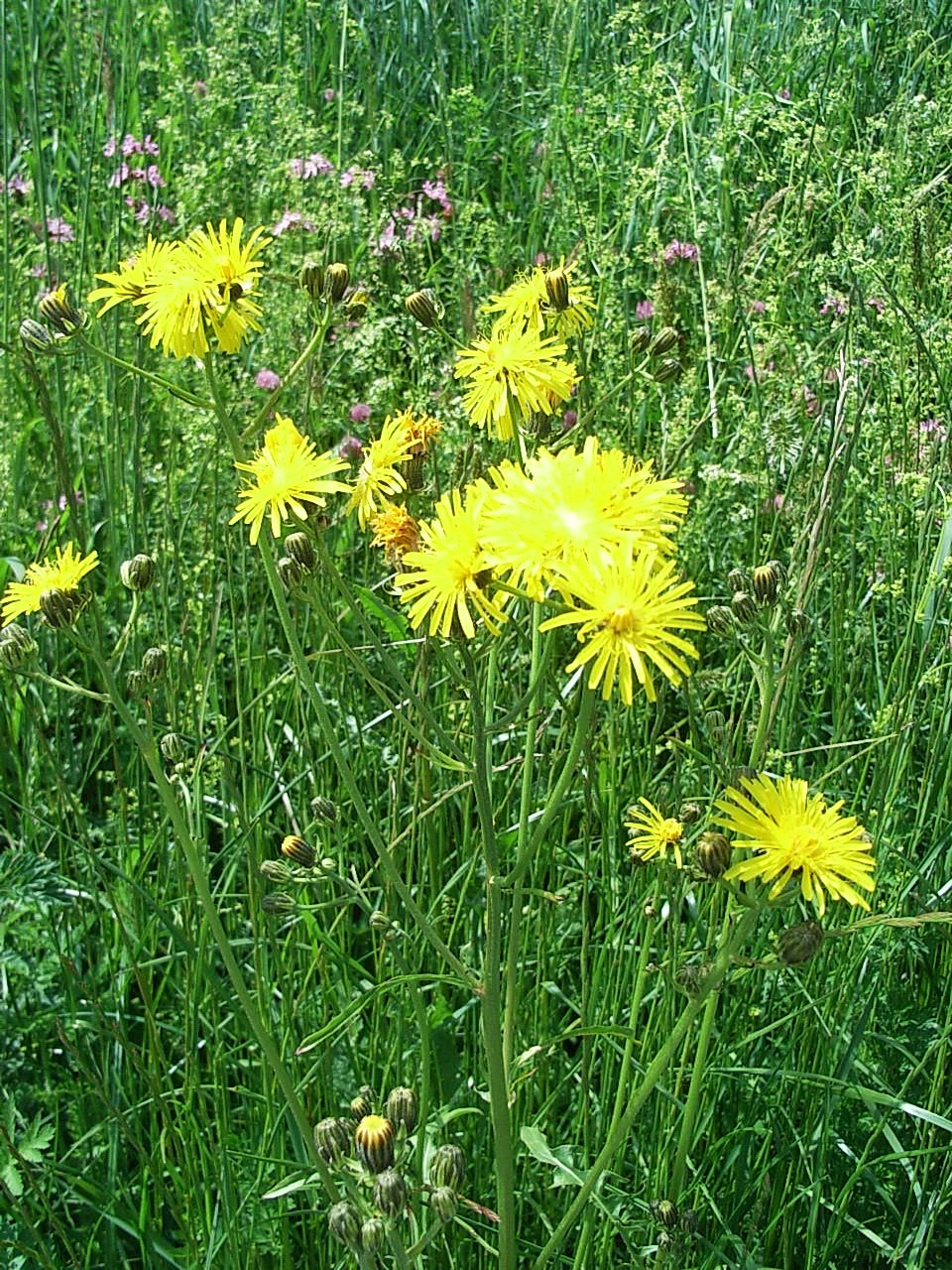 Wiesen-Pippau, Passau